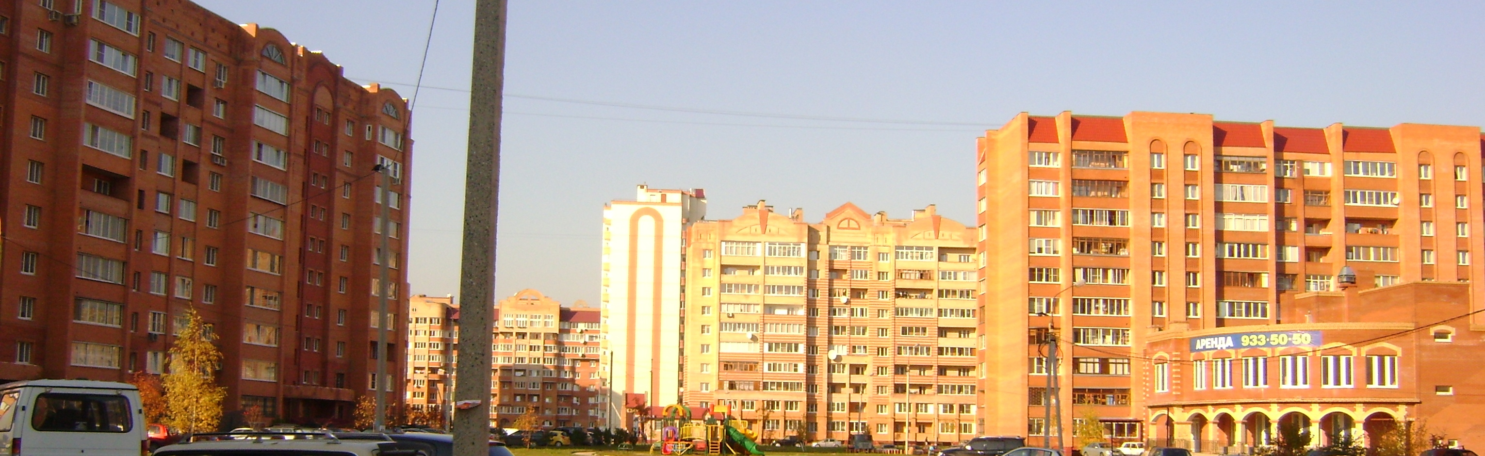 Микрорайон Дружба,Улица Дружбы